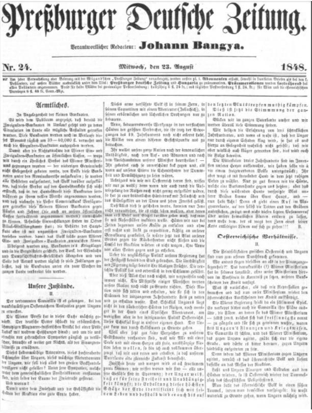 Pressburger Deutsche Zeitung vychádzali v Bratislave r. 1848.